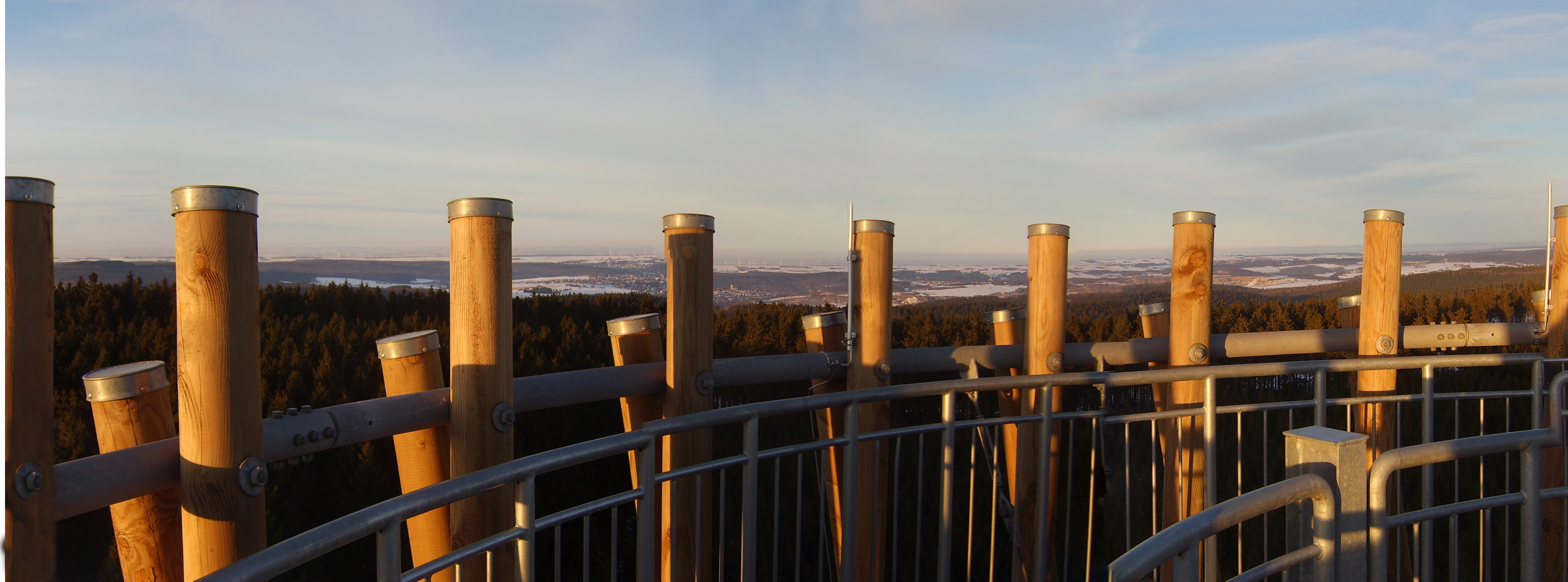 Der Lörmecke-Turm im Arnsberger Wald nahe Meschede. Blick von der Aussichtsplattform. 26 MPixel.